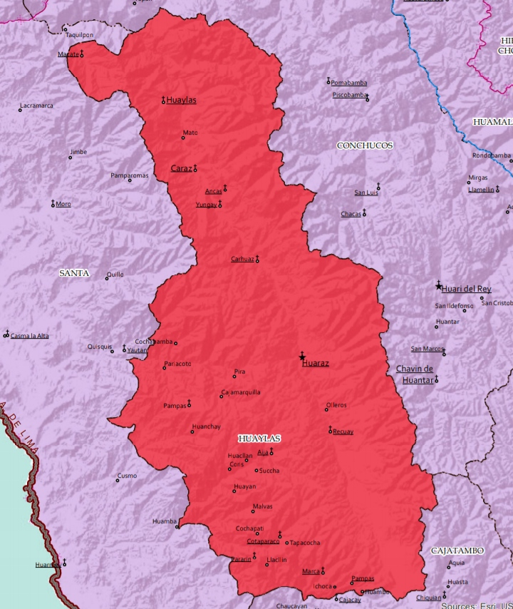 Mapa del corregimiento de Huaylas en 1701